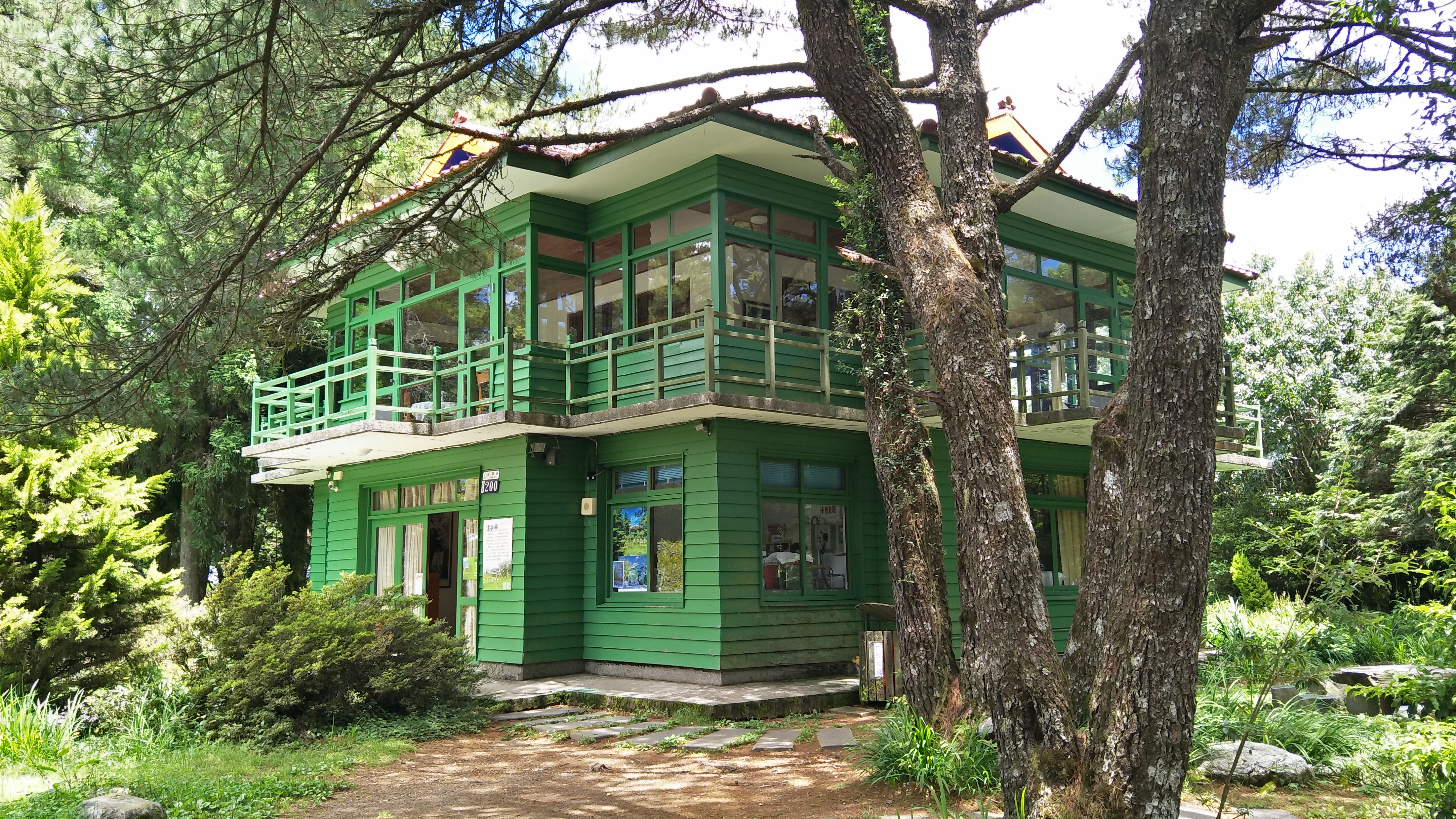 福壽山農場達觀亭的側面